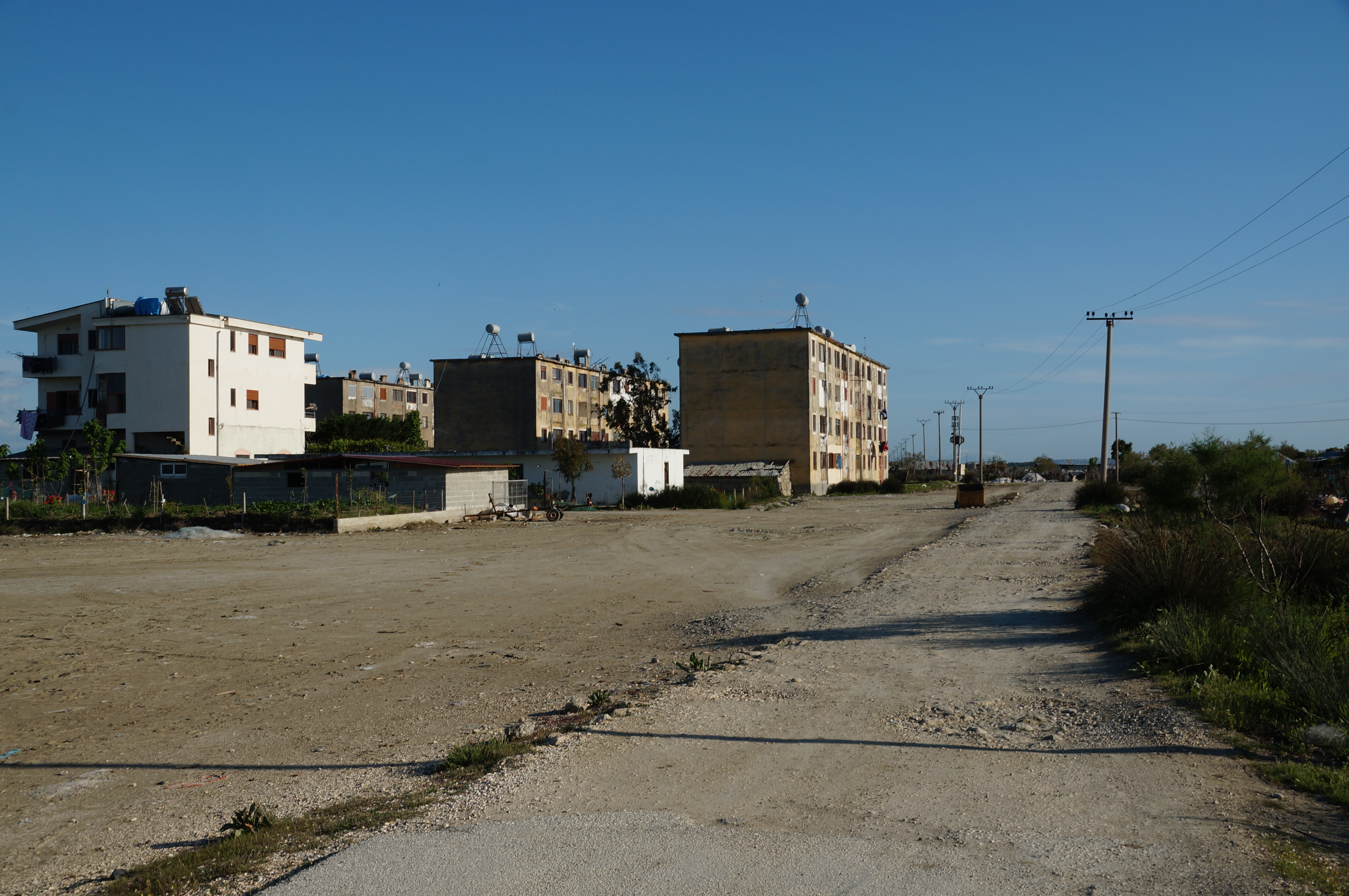 Adriatik village in Divjaka commune